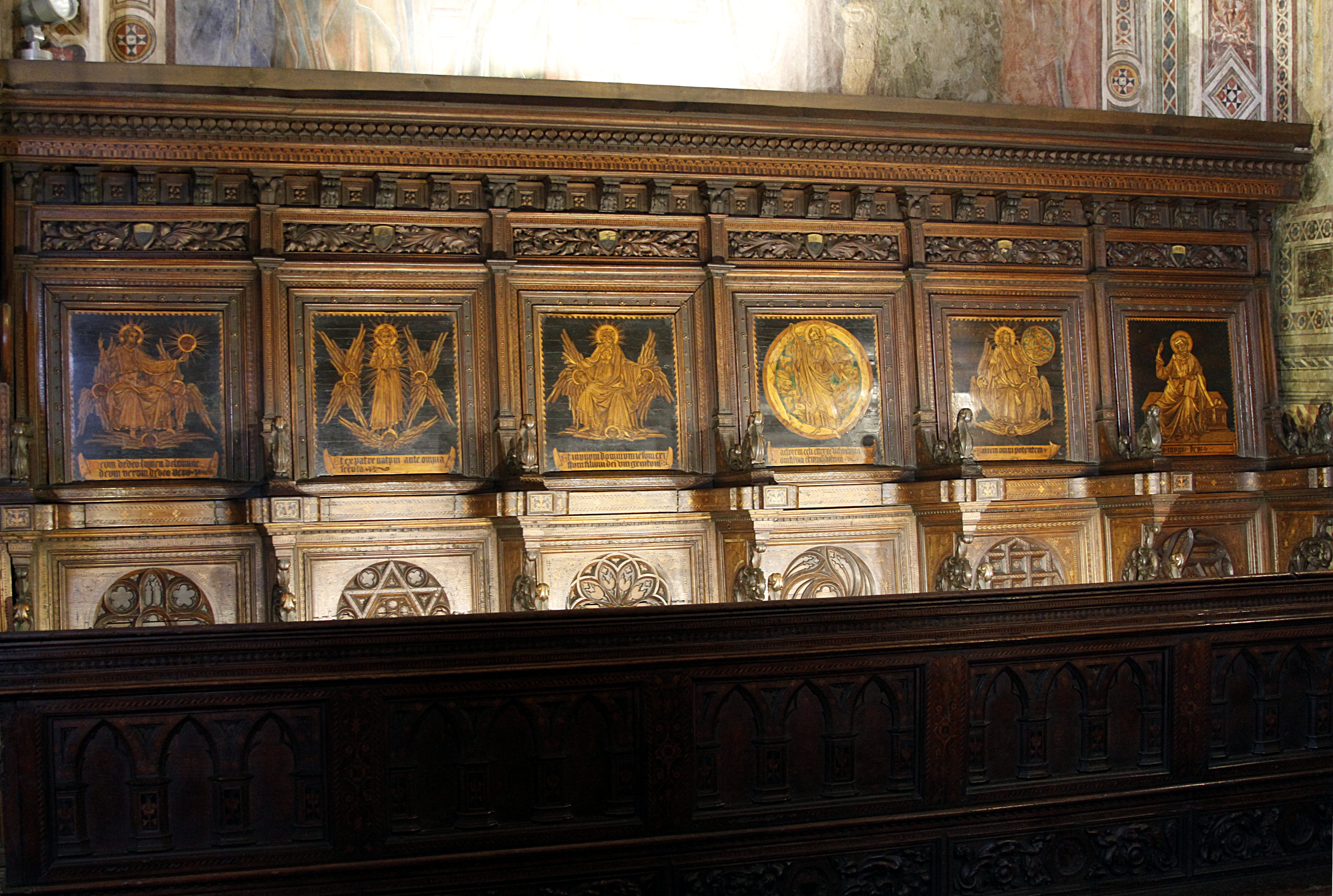 Palazzo Pubblico - Siena